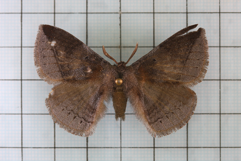 Ganisa postica fromosicola Matsumura, 1931 灰紋帶蛾 認識台灣的昆蟲10:P.10